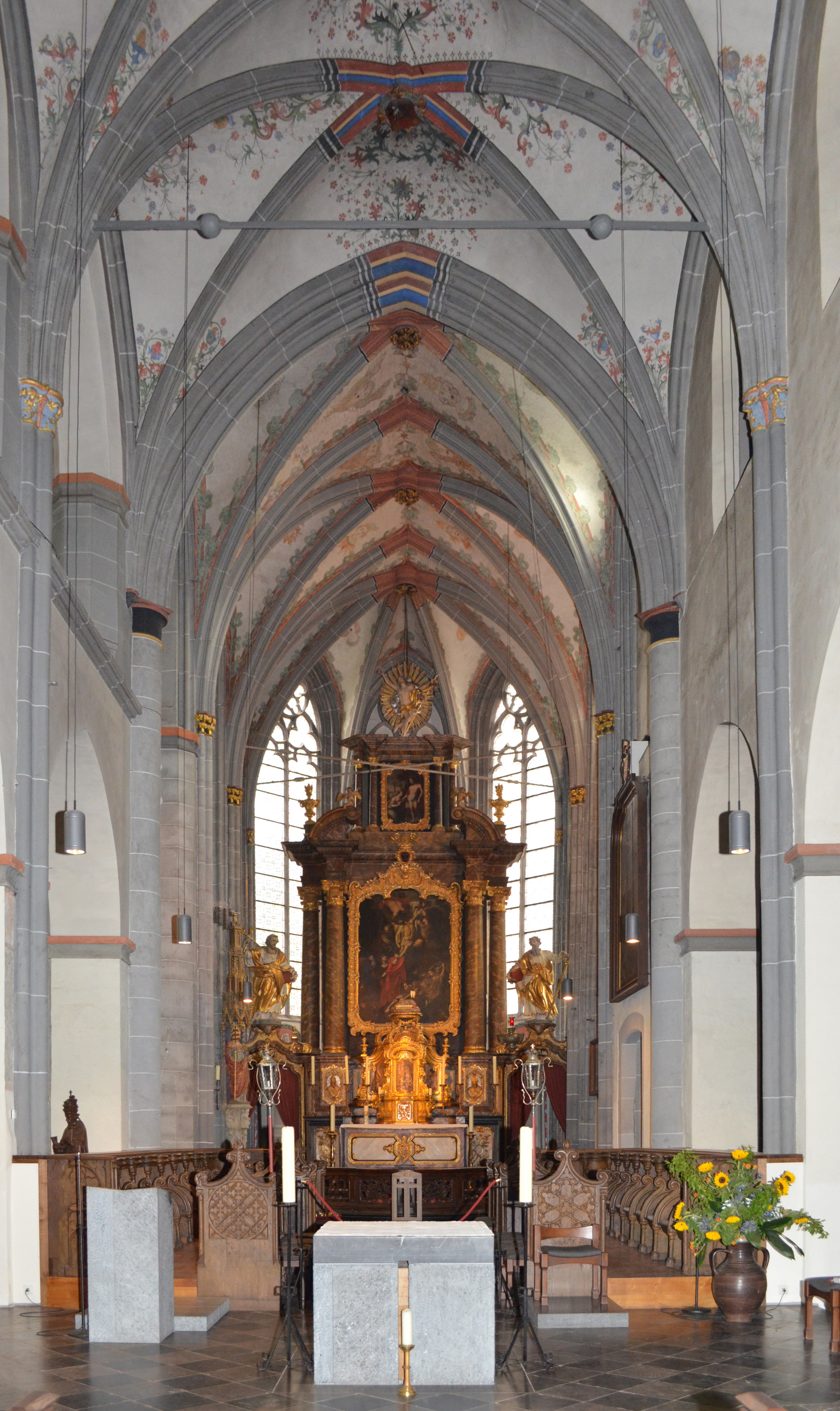 Das Mittelschiff der Kirche St. Kornelius in Kornelimünster